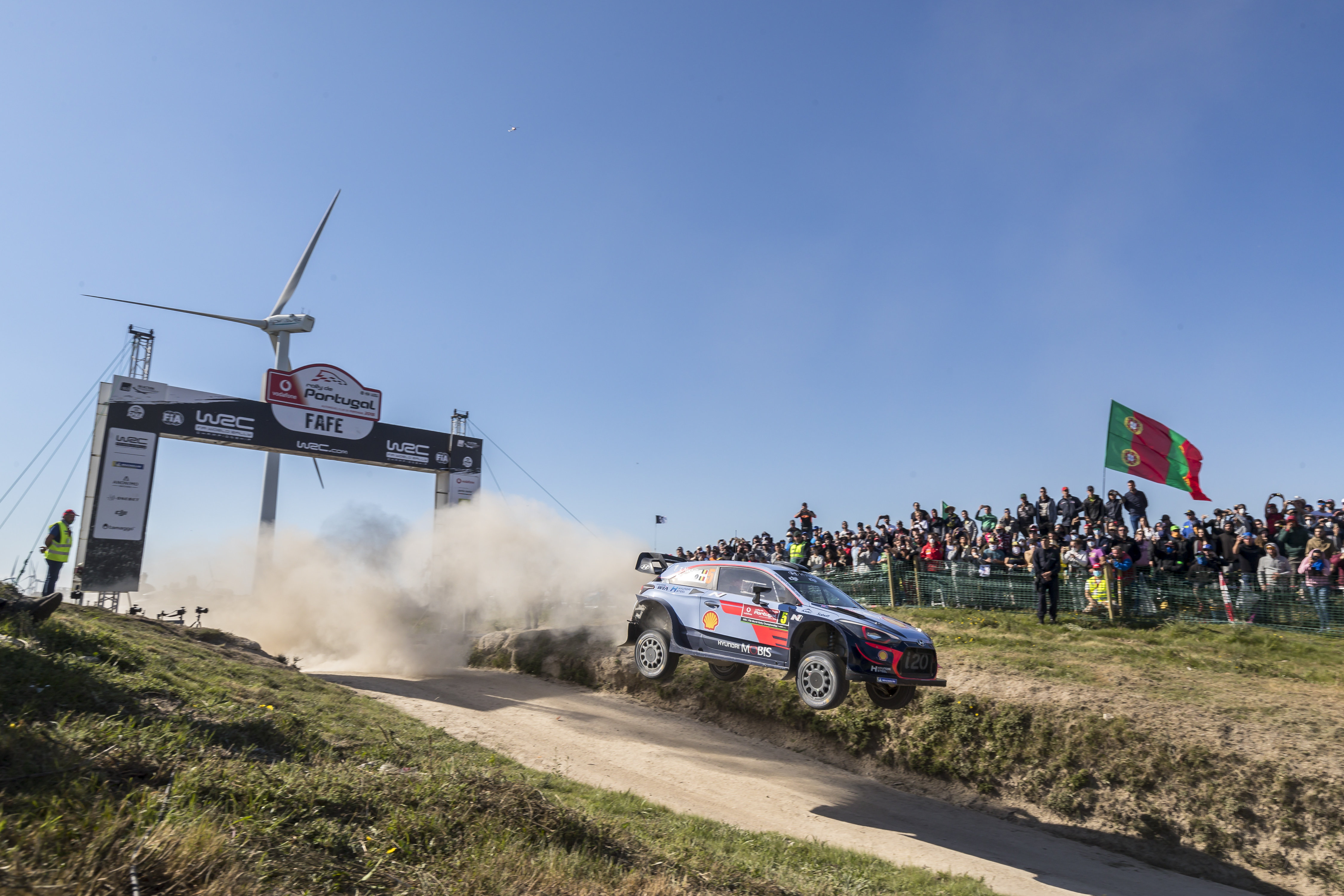 Thierry Neuville podczas Rajdu Portugalii 2018